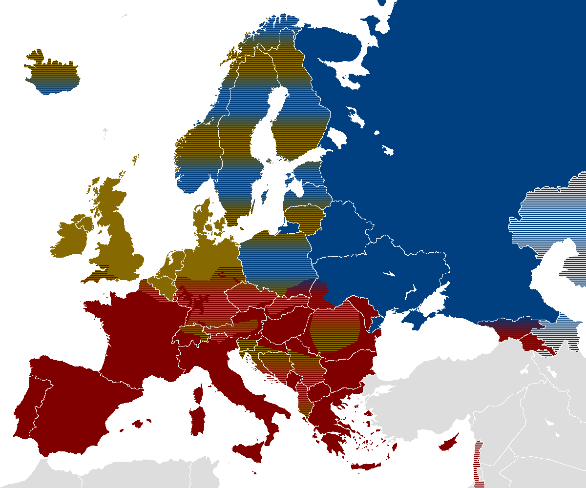 Deutsch (de): Die europäischen Alkoholgürtel. Quelle? Vodka Wein Bier English (en): The European Alcohol belts. source? Vodka Wine Beer español (es): Zonas de producción de alcohol en Europa. procedencia? Vodka Vino Cerveza italiano (it): Zone di produzione di alcol in Europa. fonte? Vodka Vino Birra ქართული (ka): ევროპაში ალკოჰოლის სმა. არაყი ღვინო ლუდი Nederlands (nl): De Europese Alcoholgordels. bron? Wodka Wijn Bier polski (pl): Napoje alkoholowe w Europie. źródło? Wódka Wino Piwo русский (ru): Предпочитаемые алкогольные напитки в Европе. источник? Водка Вино Пиво svenska (sv): Europas alkoholbälten. källa? Vodka Vin Öl